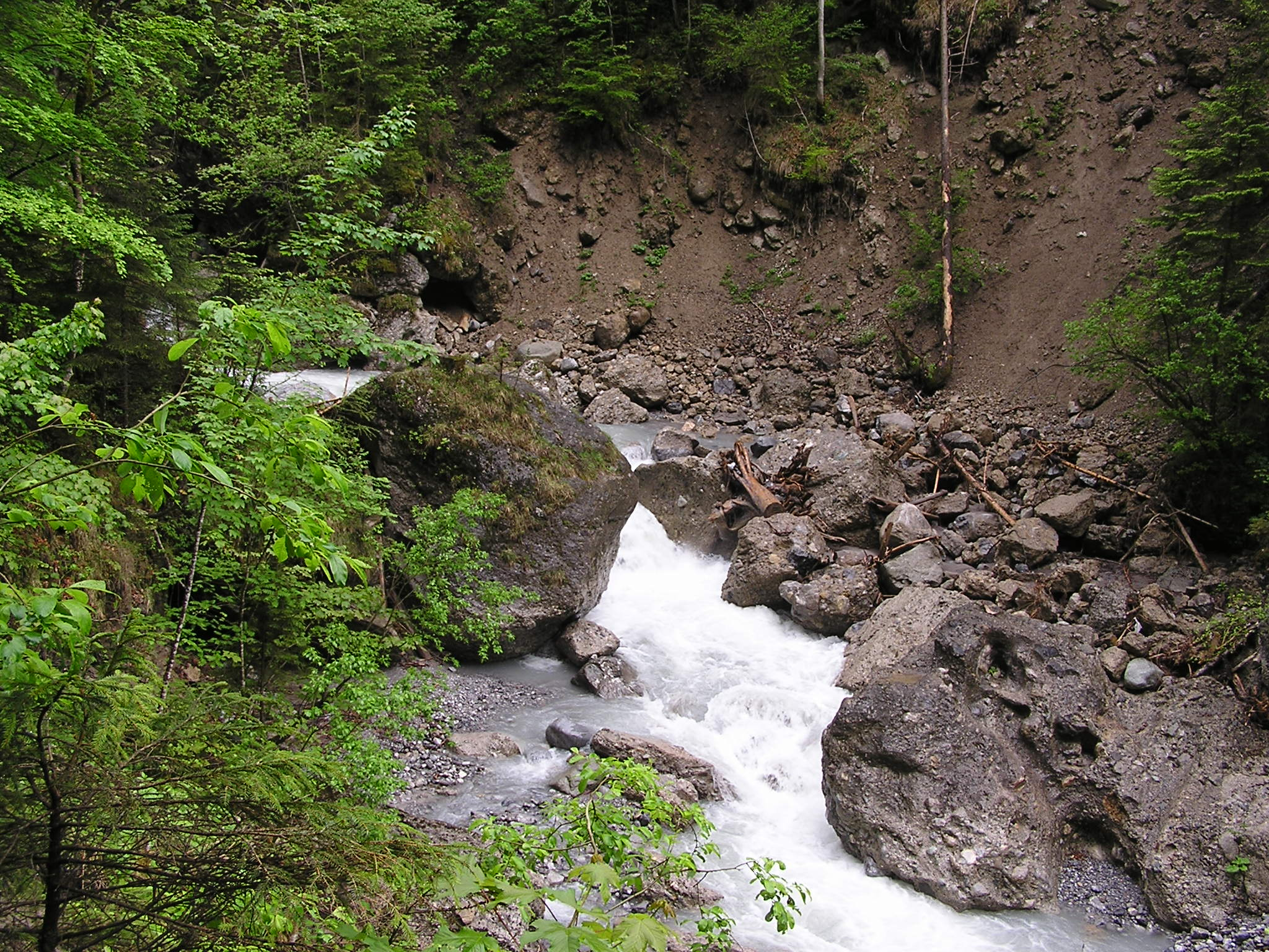 Bürser Schlucht Ort & Datum: 21.05.2006